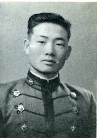 Chun Doo-hwan, 1951